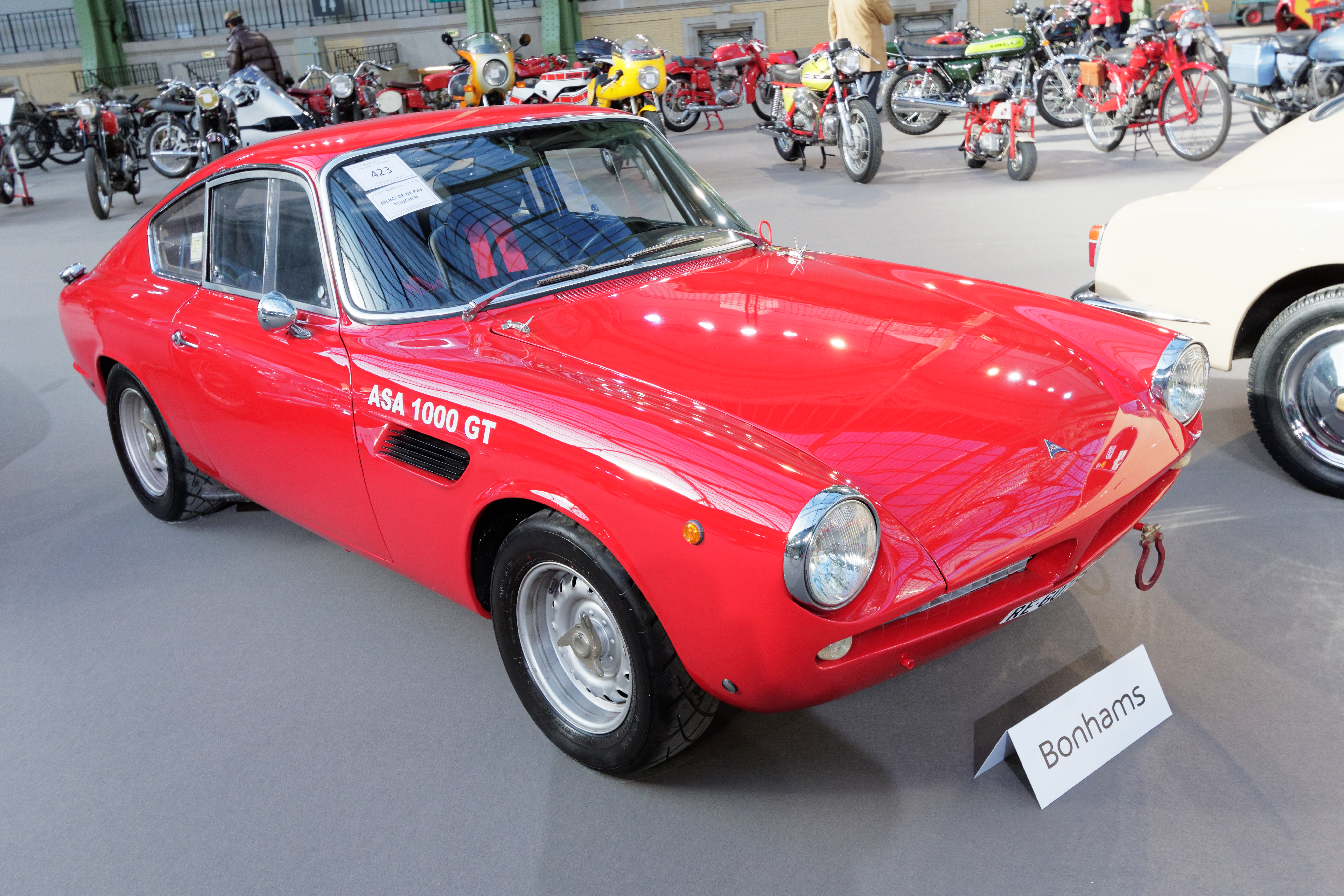 Un des véhicules présenté lors de la vente aux enchères Bonhams 2015 au Grand Palais de Paris.